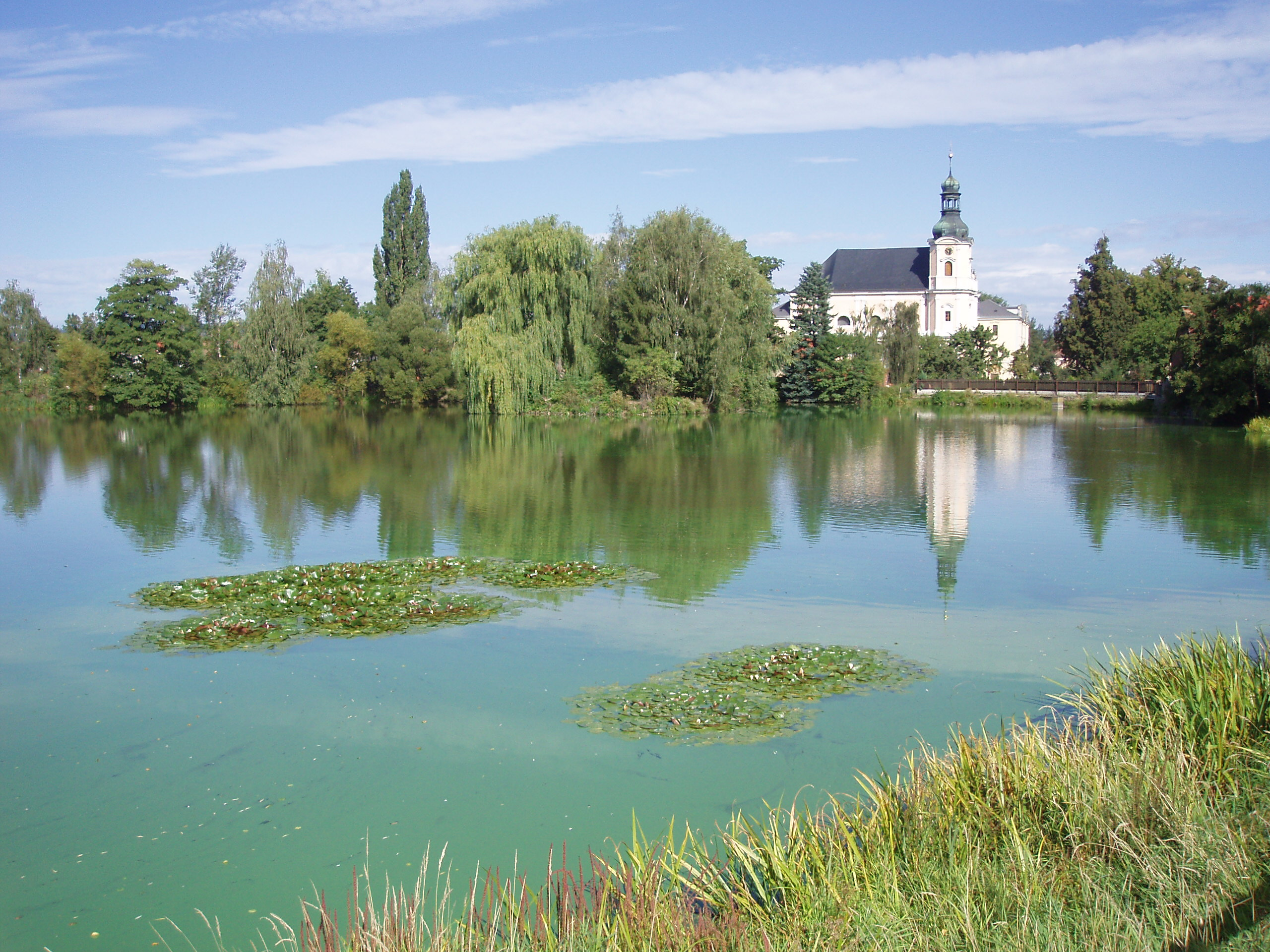 Rybník s kostelem